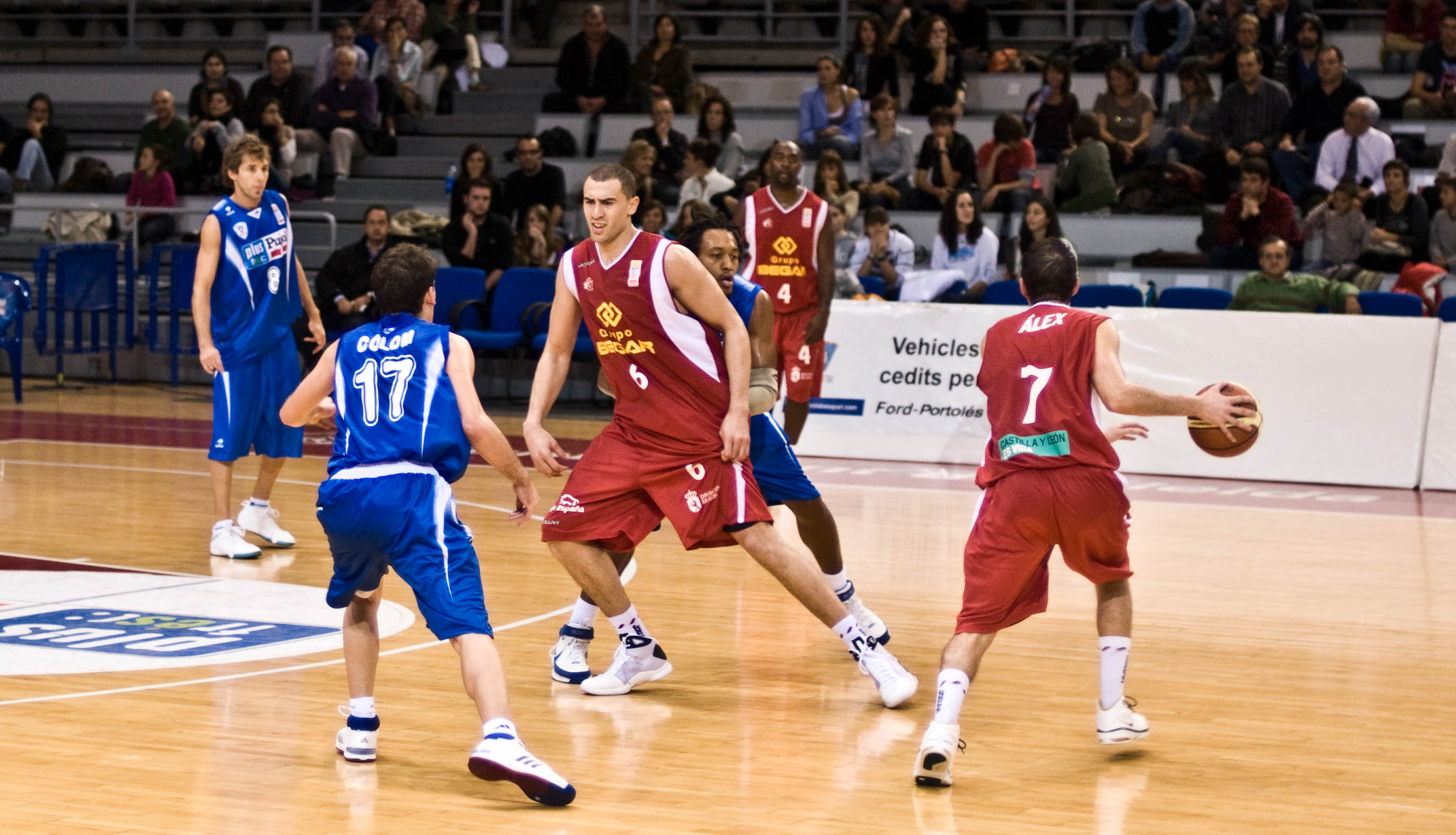 El equipo de baloncesto de la capital de León, el BEGAR León.